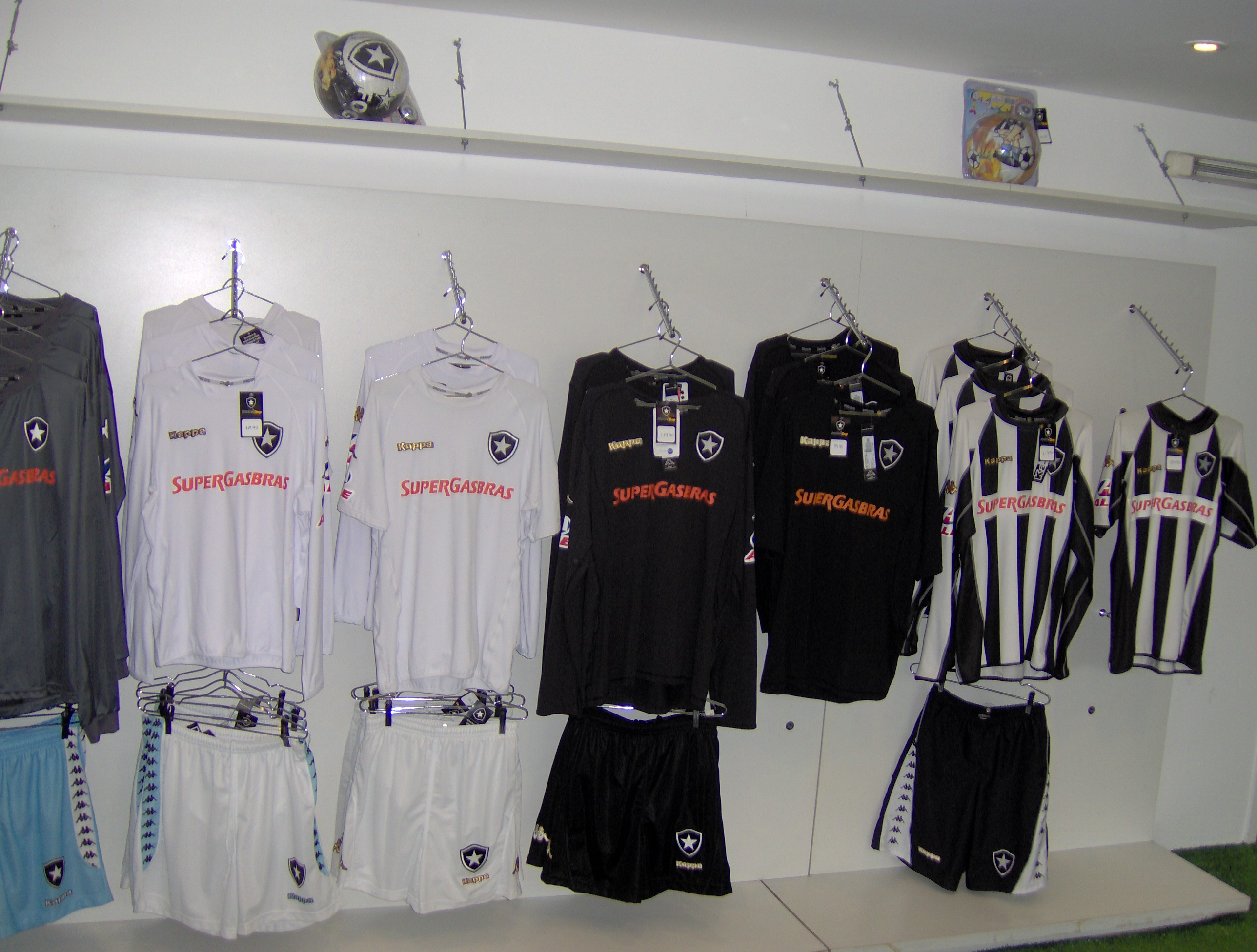 Foto de camisas do Botafogo de Futebol e Regatas para a temporada 2006-07 no cabide da loja oficial do clube.